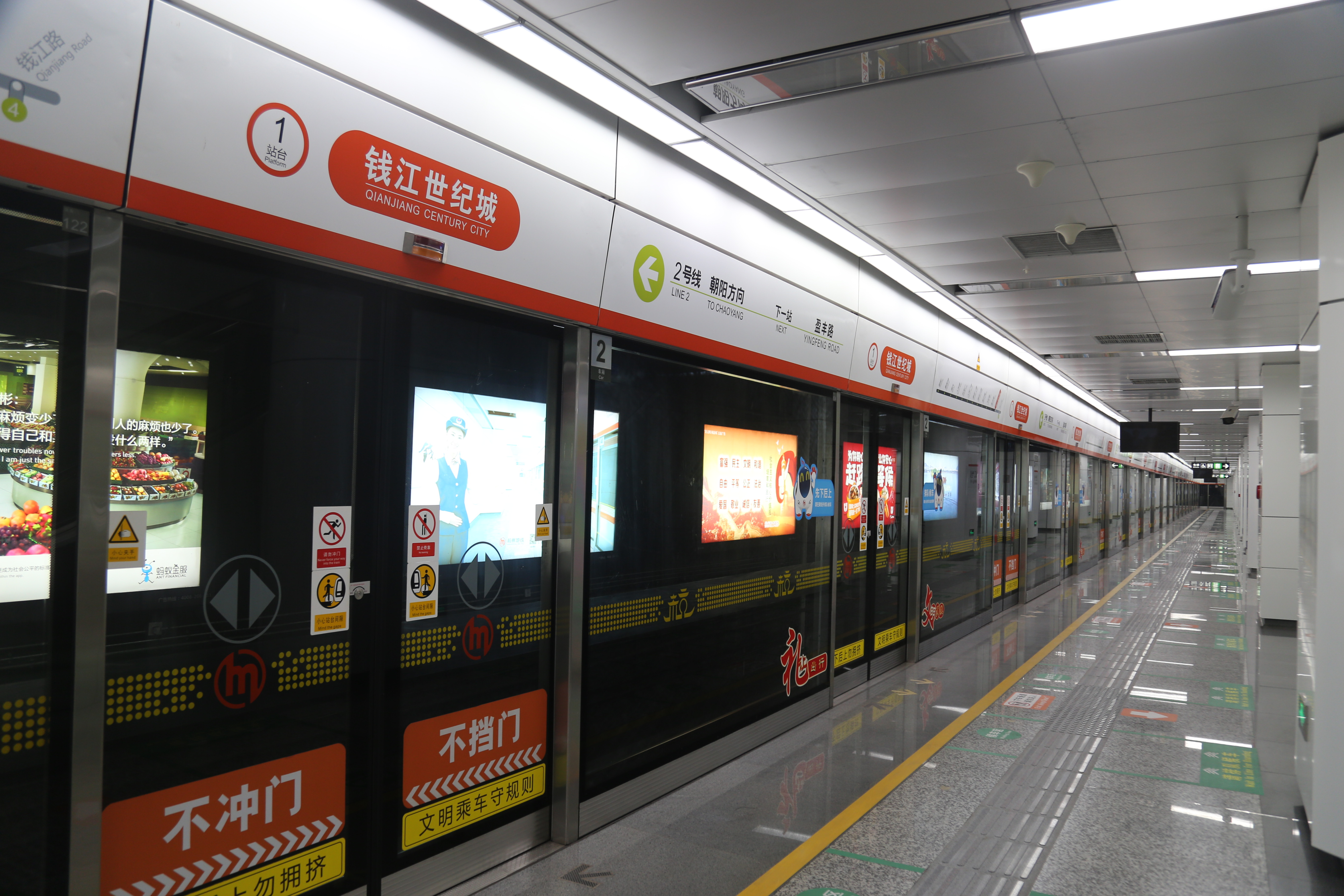 杭州地铁钱江世纪城站2号线站台